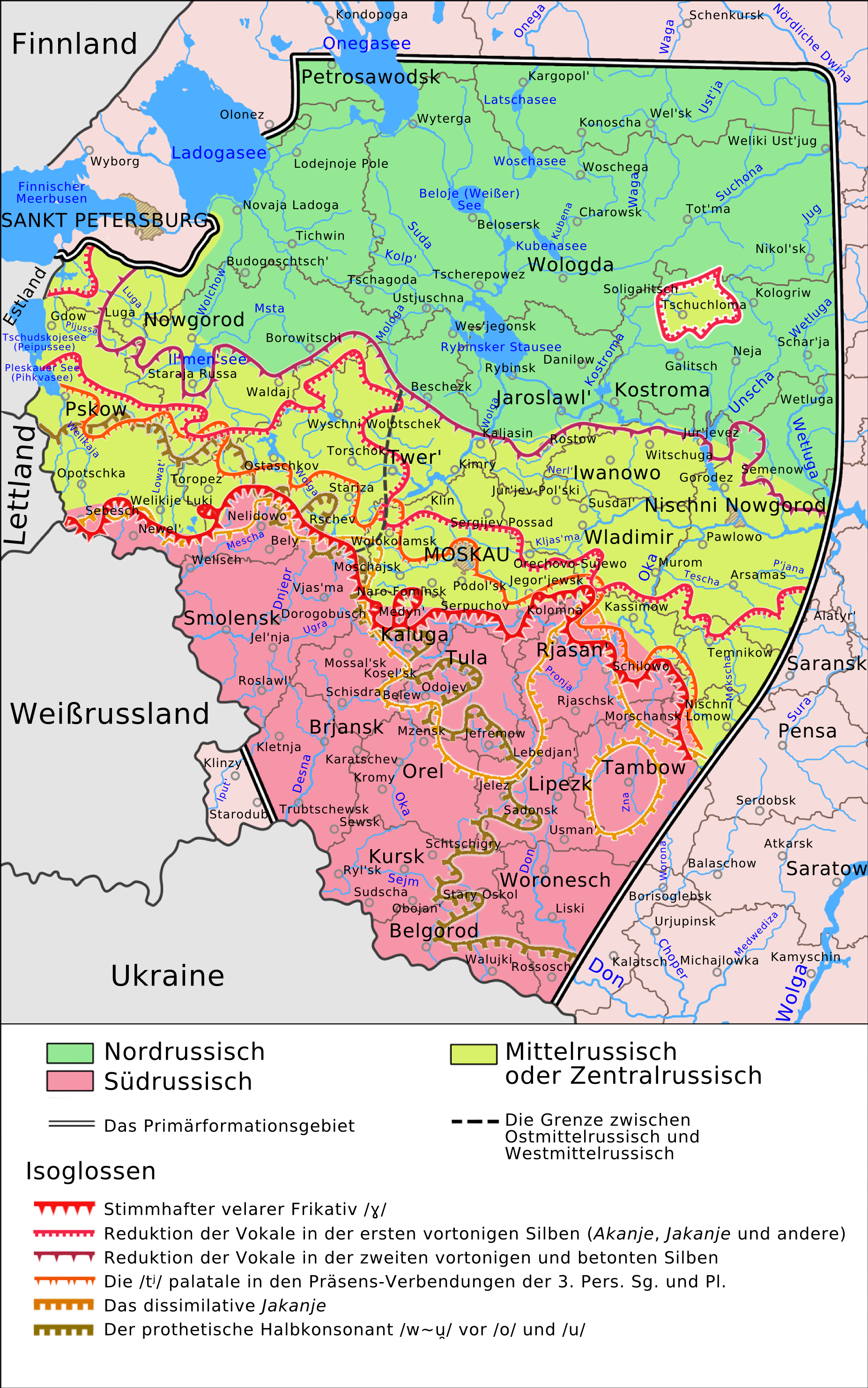 Russische Dialekte mit der Hauptisoglossen